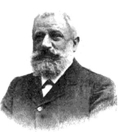 Fernand Forest (vers 1905).